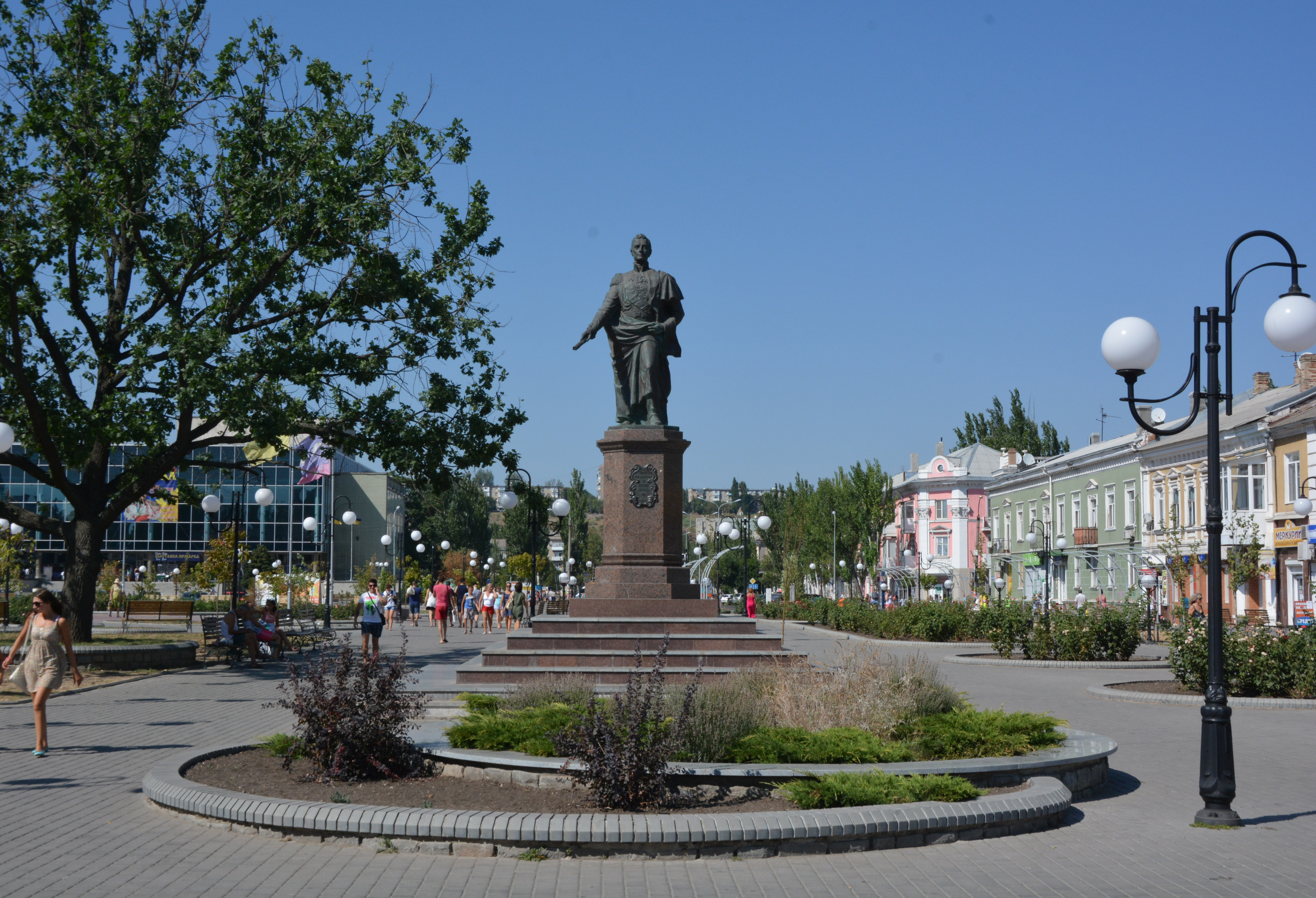 Леніна проспект, Бердянськ, просп. Леніна